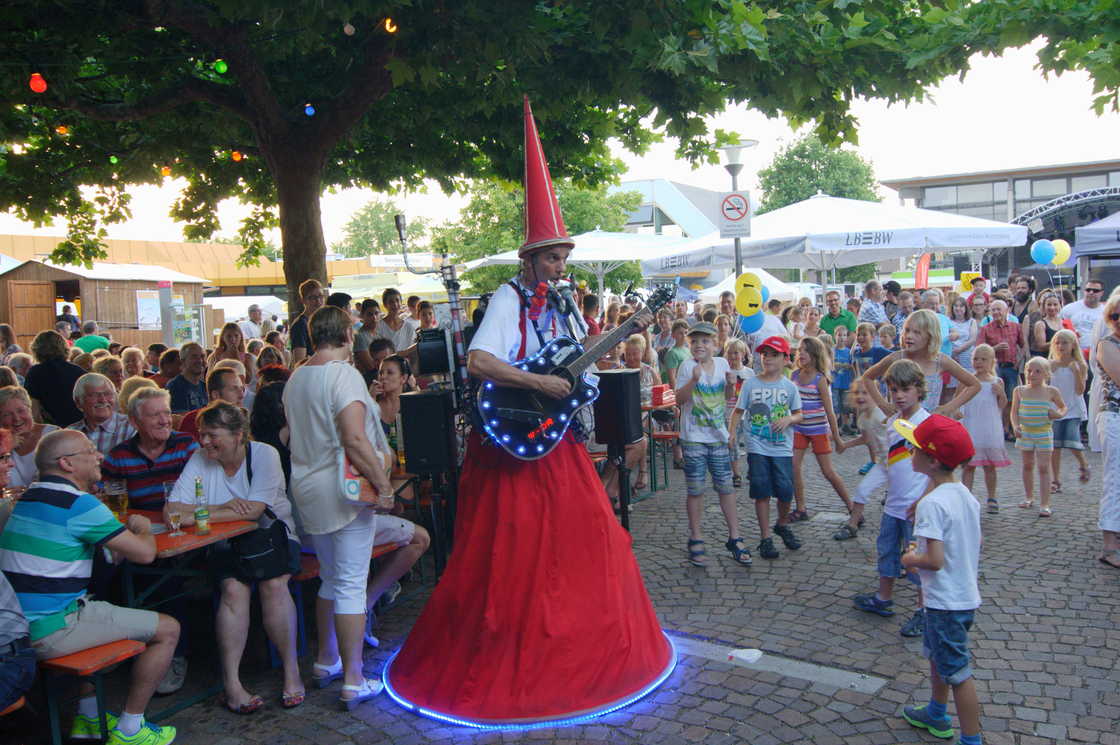 Bürgerfest in Freiberg am Neckar